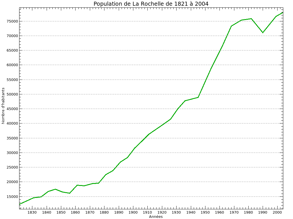 Graphique de l'évolution du nombre d'habitants de La Rochelle de 1821 à 2004 réalisé avec Kst à partir des données de l'Insee.